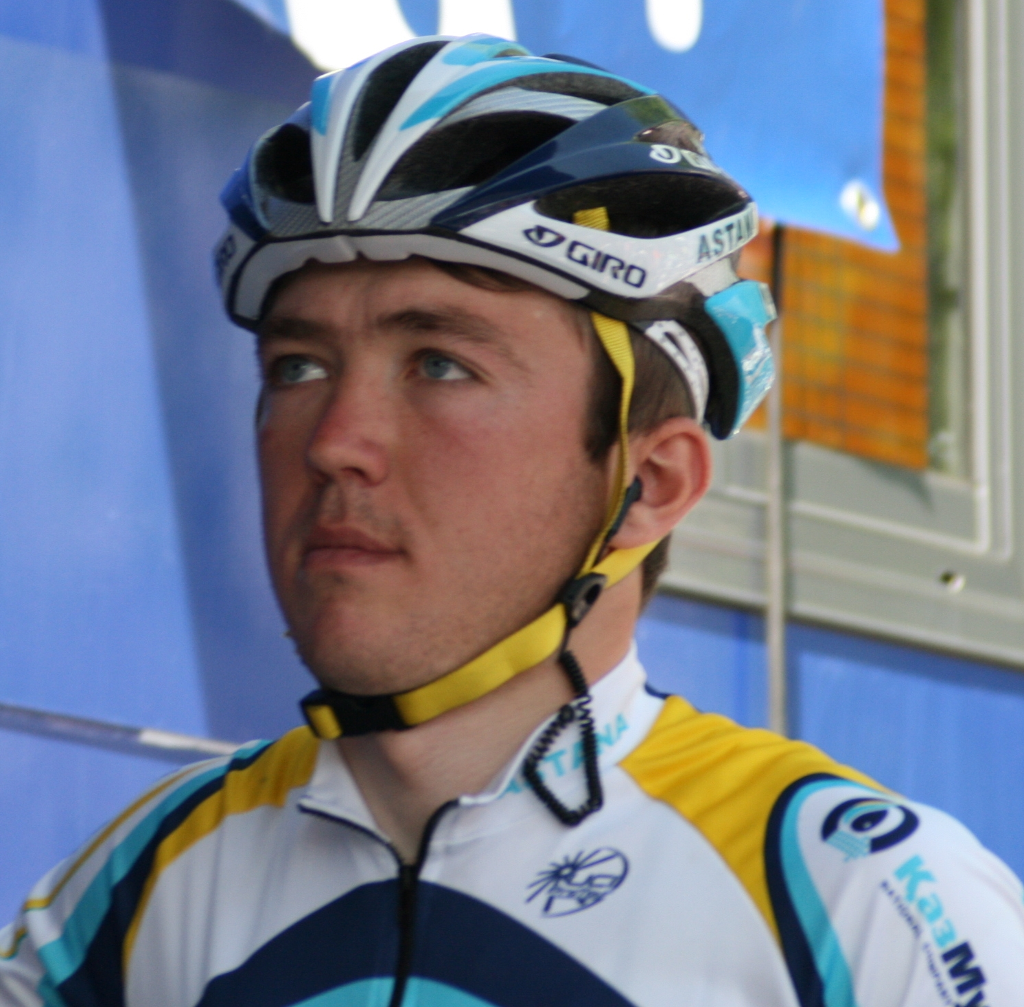 Roman Kireyev aux Quatre jours de Dunkerque 2008